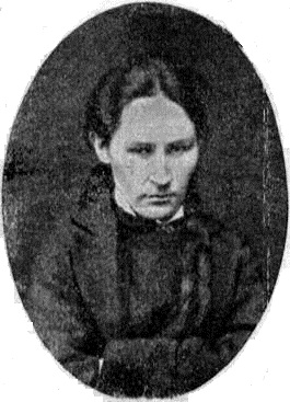 Marija Aleksandrovna Kolenkina (1850-1926)